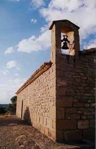 Imagen de la ermita de Snta Quitería